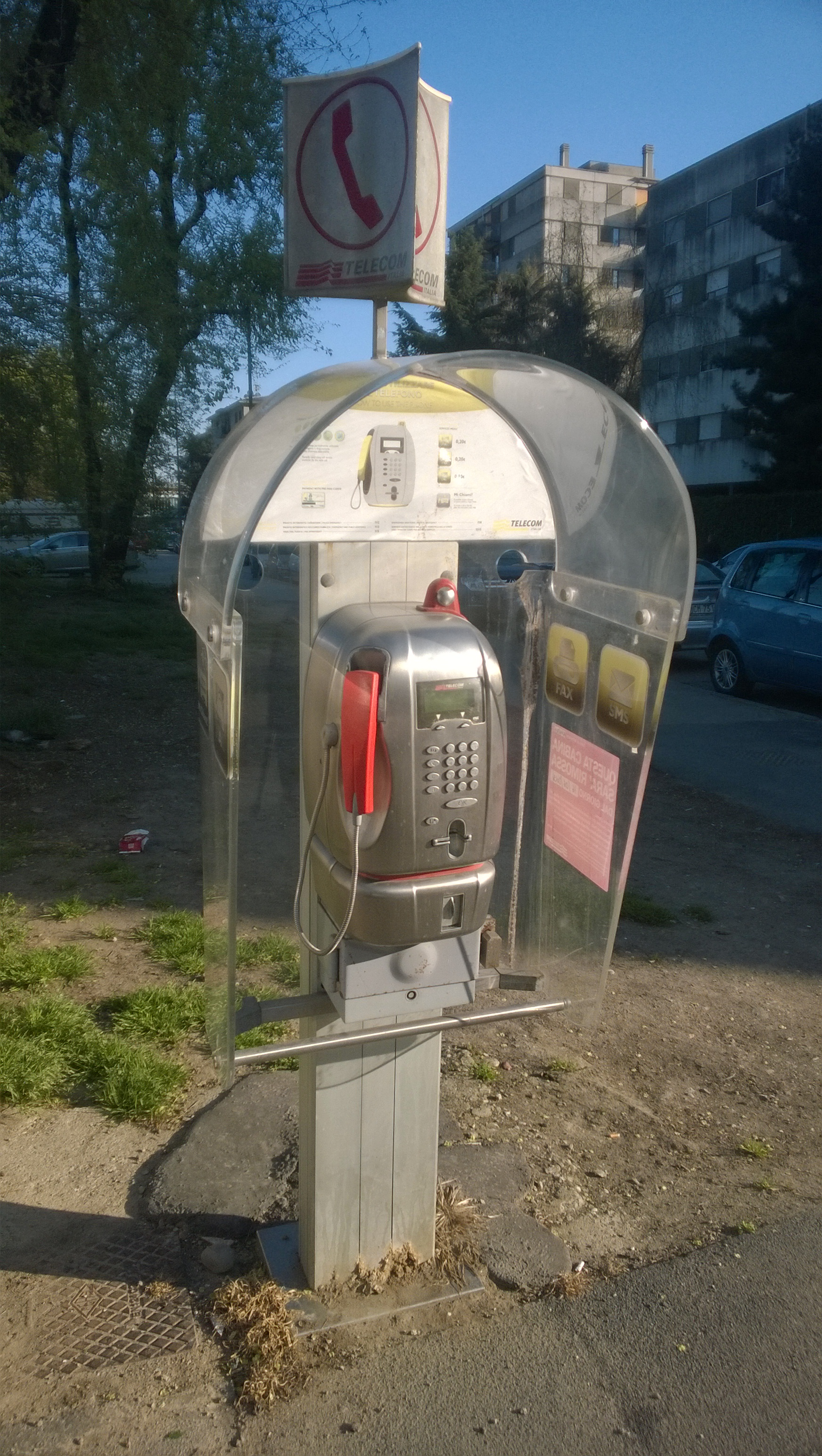 Un telefono pubblico di tipo Digito a Milano.